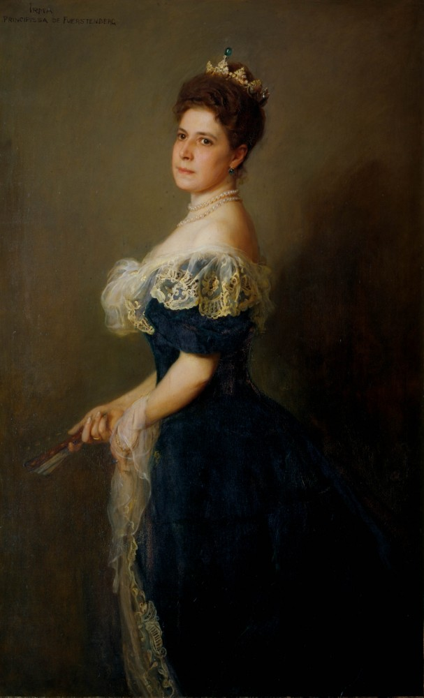 Irma Fürstin zu Fürstenberg, née Countess Schönborn-Buchheim